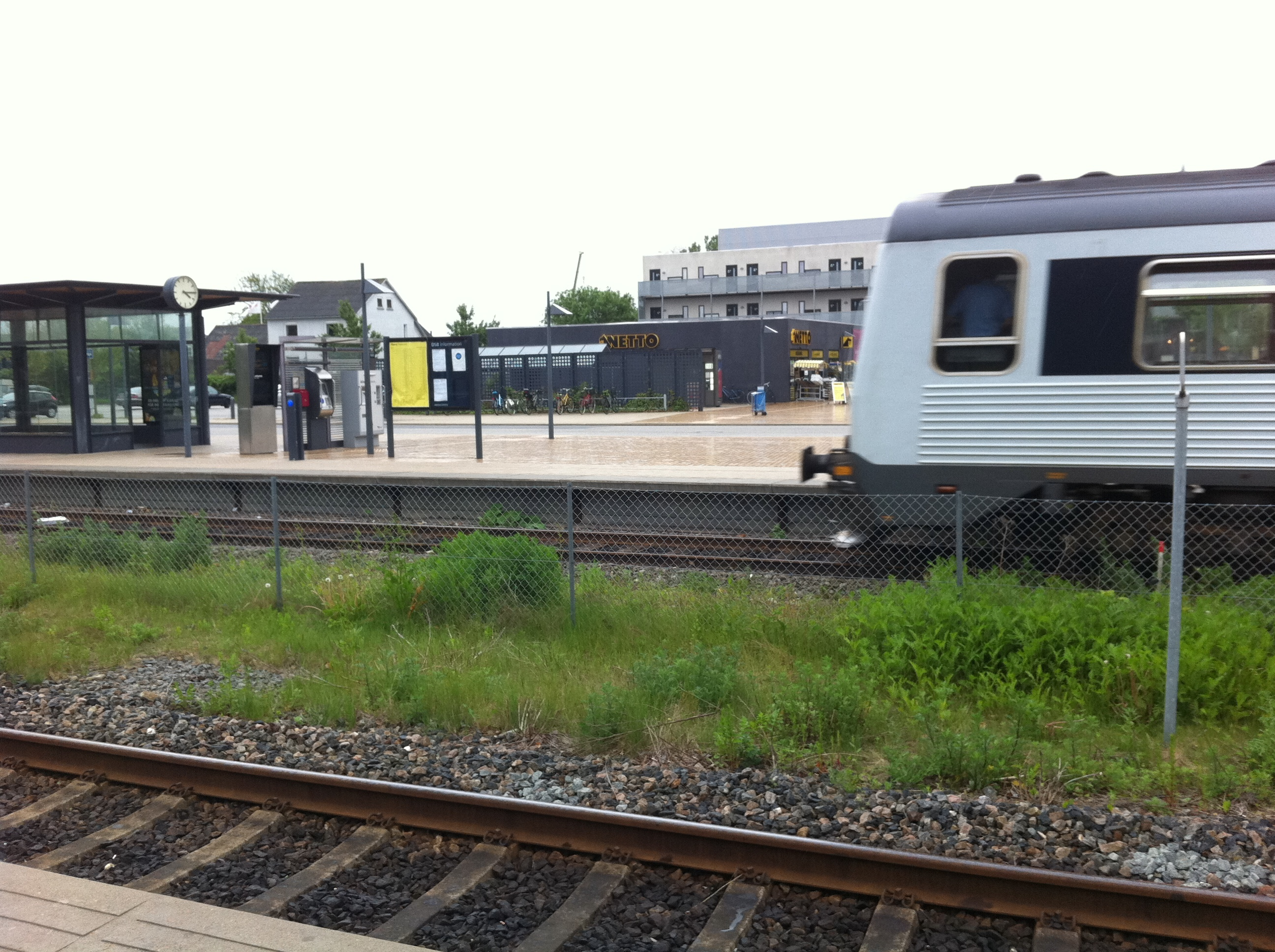 Lindholm station